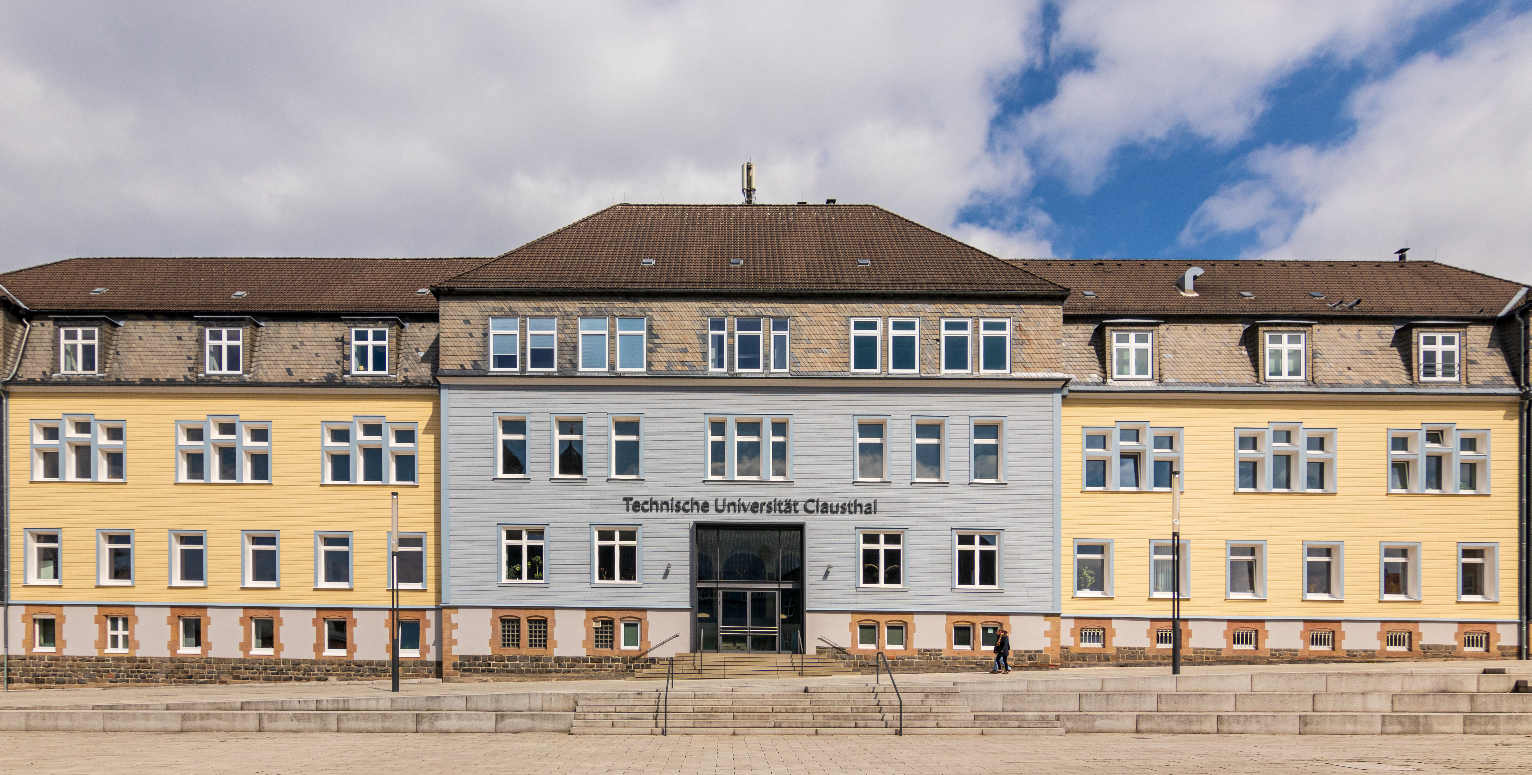 Hauptgebäude der Technischen Universität Clausthal (errichtet von 1903 bis 1906)